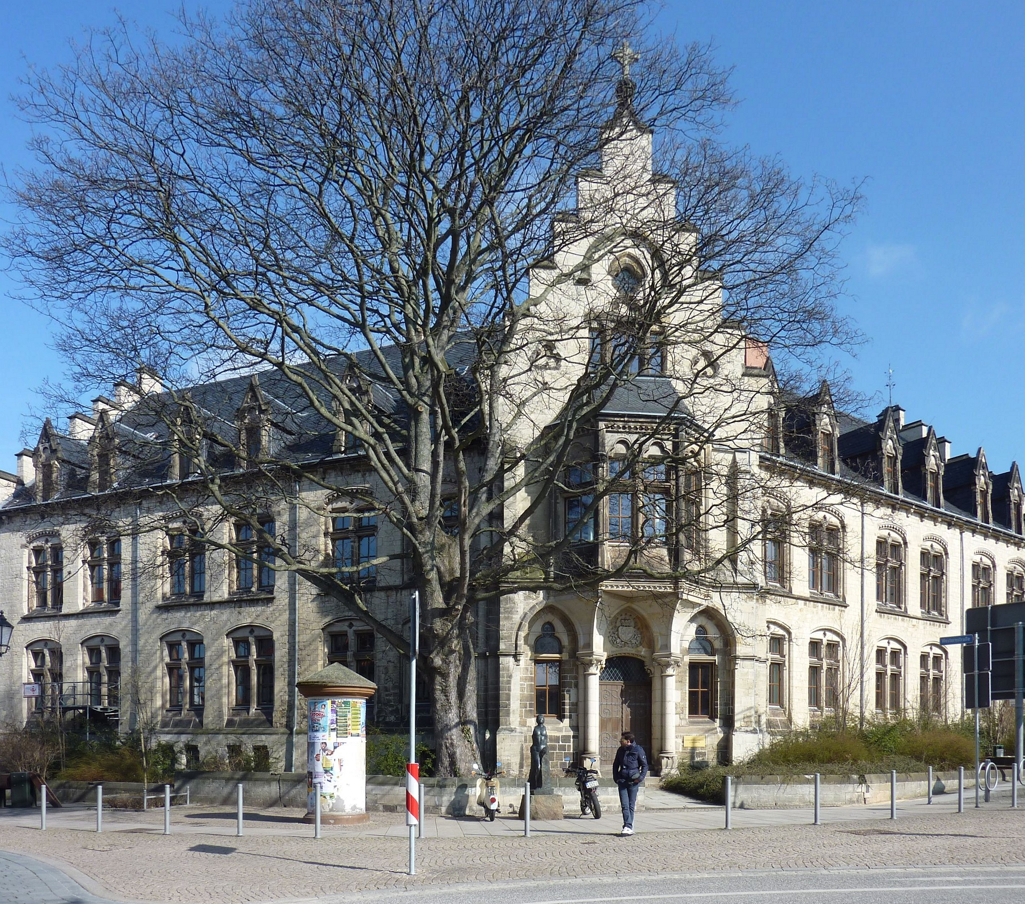 Gerhart-Hauptmann-Gymnasium Wernigerode